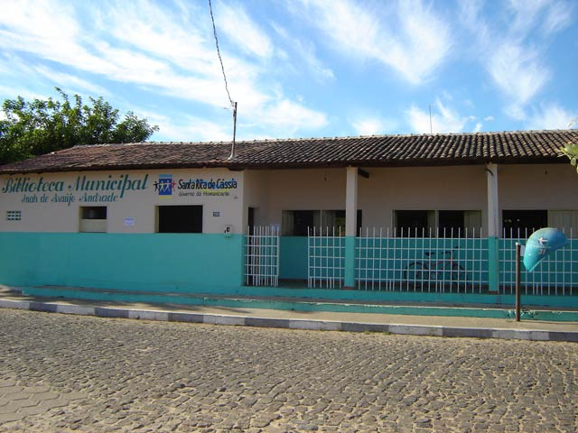 Foto da principal biblioteca pública do município de Santa Rita de Cássia - BA.